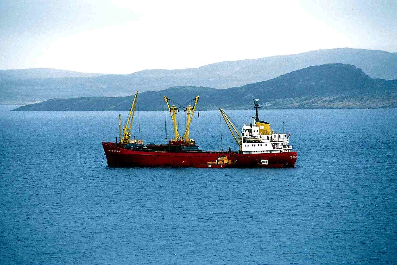 Supply ship, Baffin Island, Nunavut, Canada